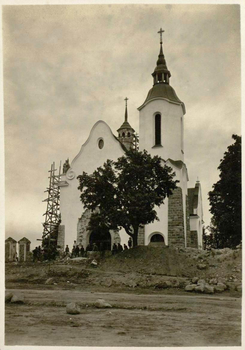 Беларуская (тарашкевіца): Солы (Soły), пляц Рынак (plac Rynak). Касьцёл Маці Божай Ружанцовай